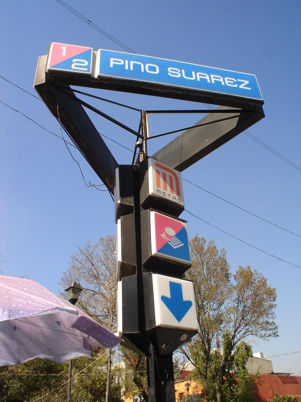 ESTACION PINO SUAREZ